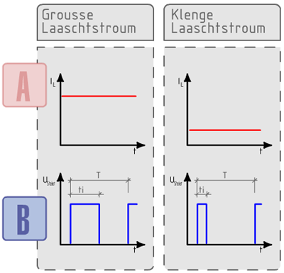 Taaschtgrad vun der Steierspannung bei groussem, resp. klengem Laaschtstroum